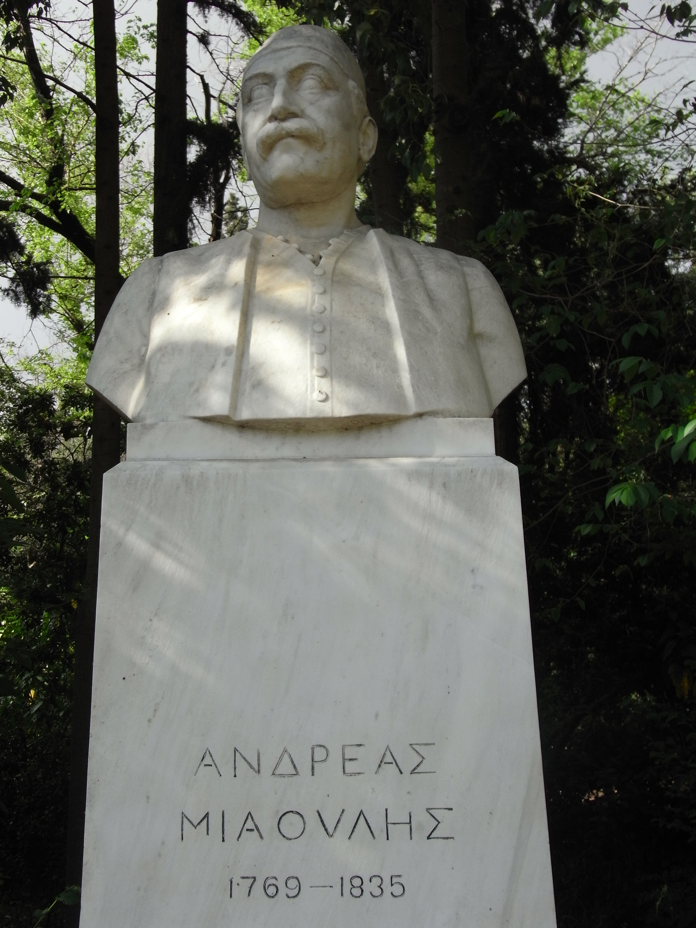 Les combattants de 21 (Αγωνιστές του 21)